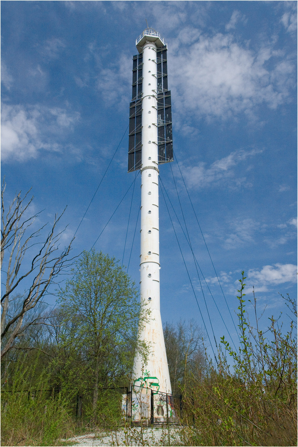 Muuga ülemine tulepaak